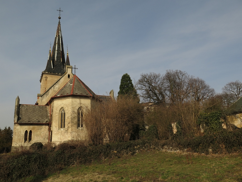 Kostel Povýšení svatého Kříže, Konárovice.